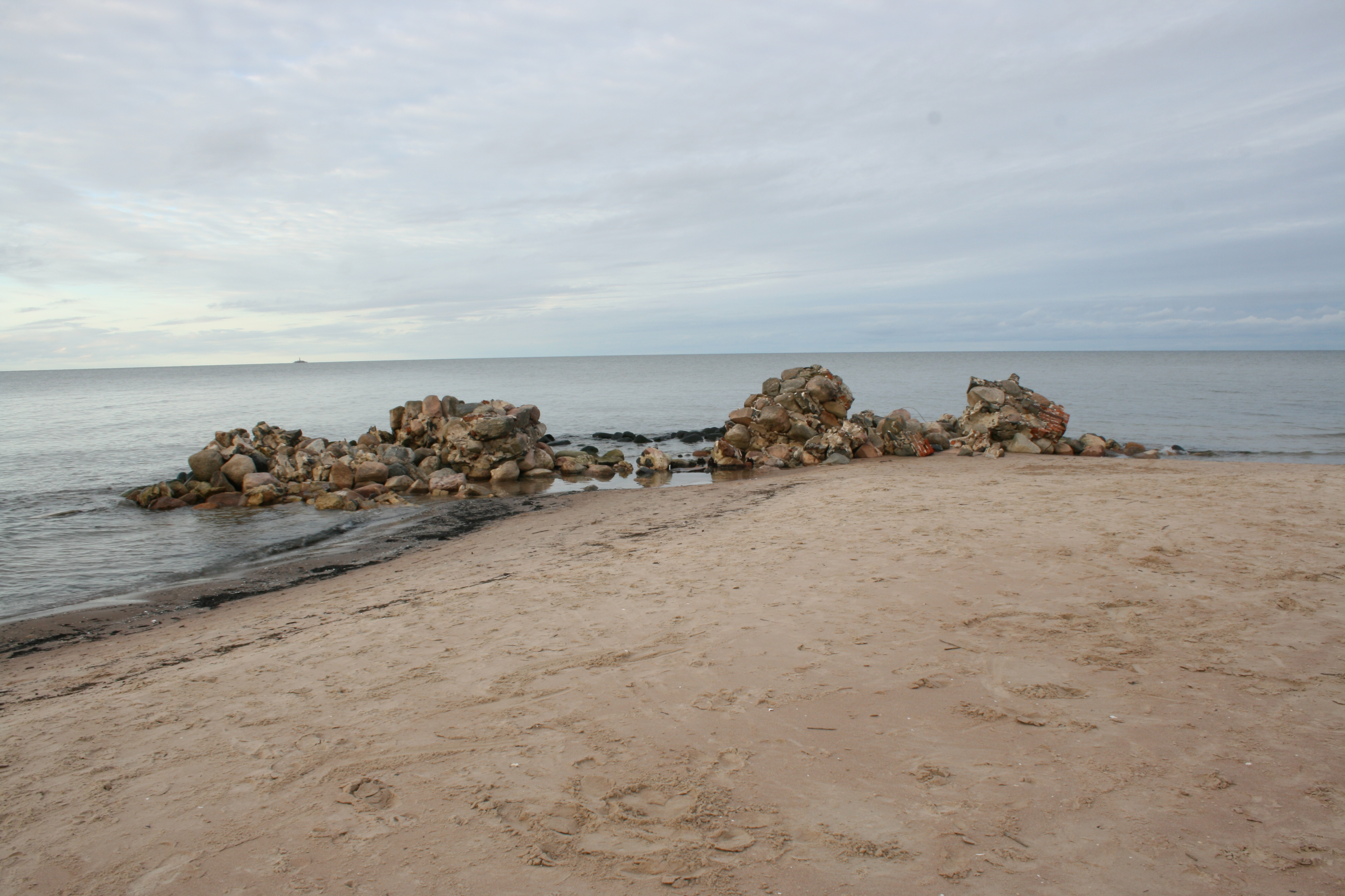 Kolkas rags